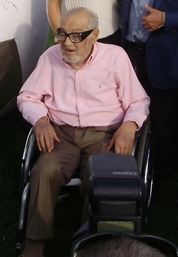 סמי עופר